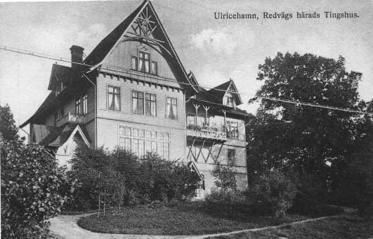 Redvägs härads tingshus, Ulricehamn. Byggnaden fungerade som tingshus mellan åren 1896 - 1970. Byggnadsår 1896 Arkitekt Emil Billing, byggmästare: Johan Linus Johansson